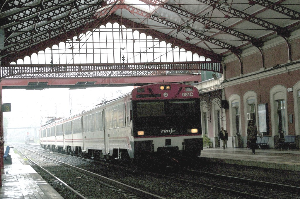 Estación del Norte de San Sebastián (España)